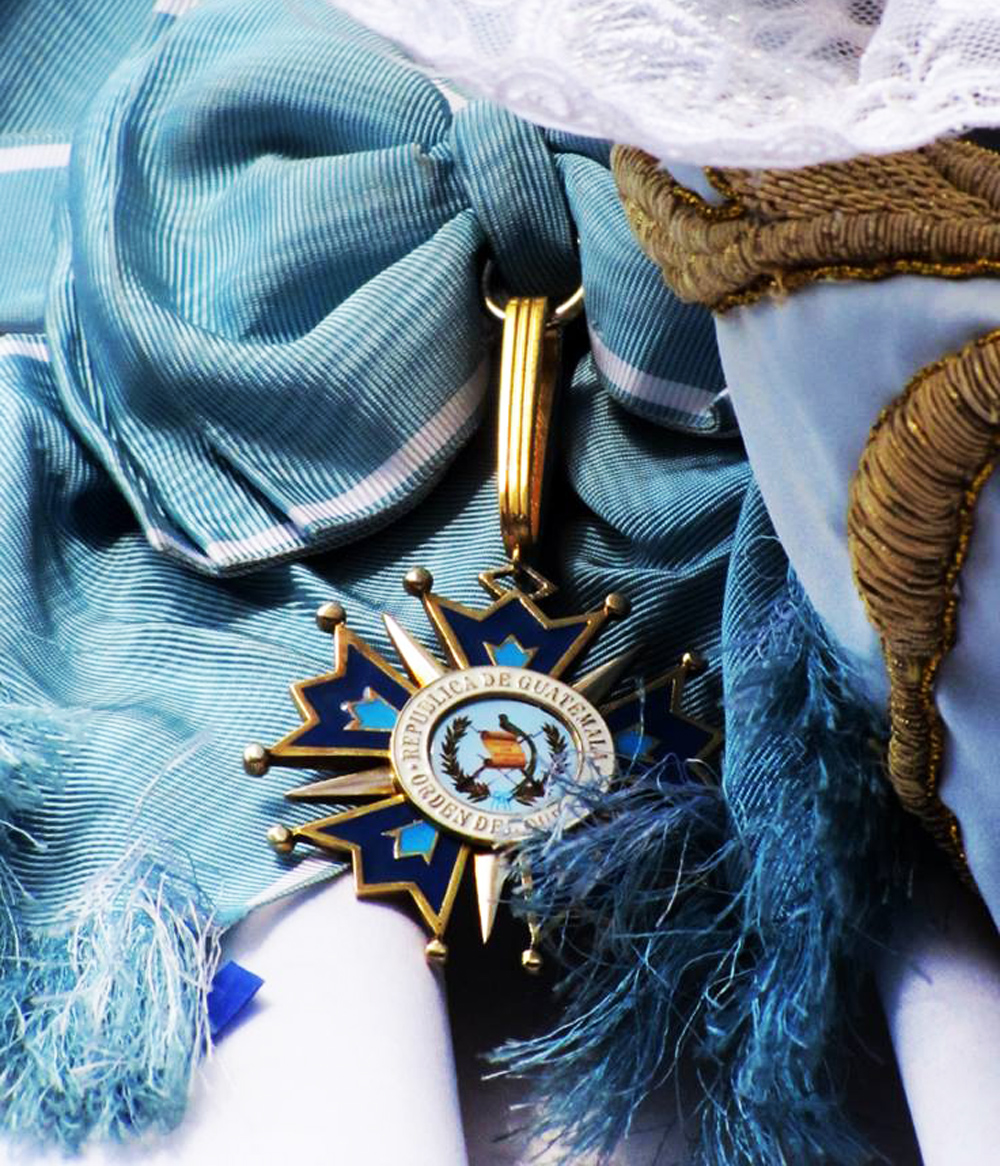 Orden del Quetzal en grado de "Gran Cruz" máximo galardón otorgado en Guatemala.